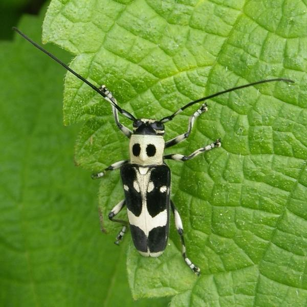 Paraglenea_fortunei(ラミーカミキリ), Nagasaki(長崎市)